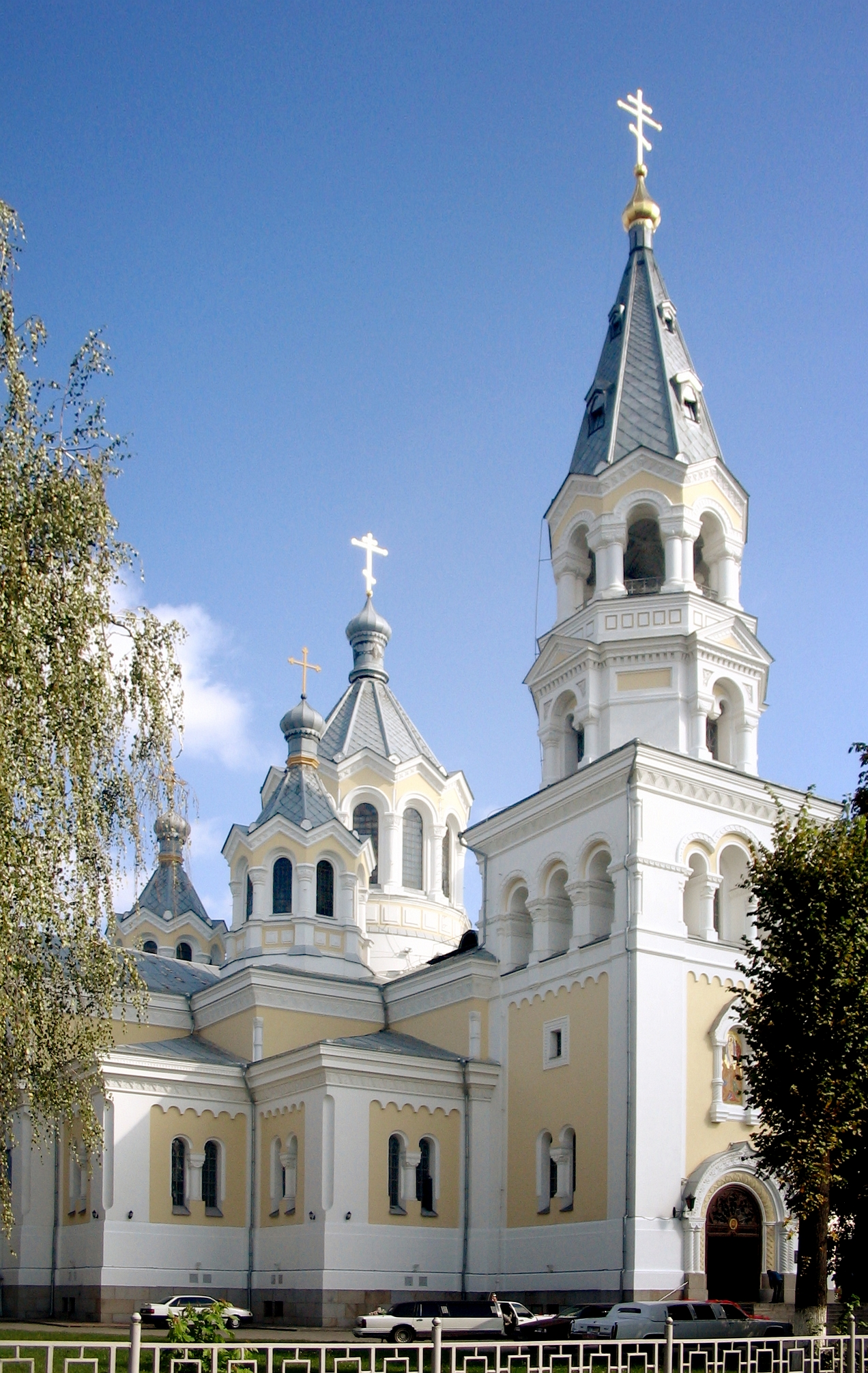 Свято-Преображенський кафедральний собор в м. Житомир